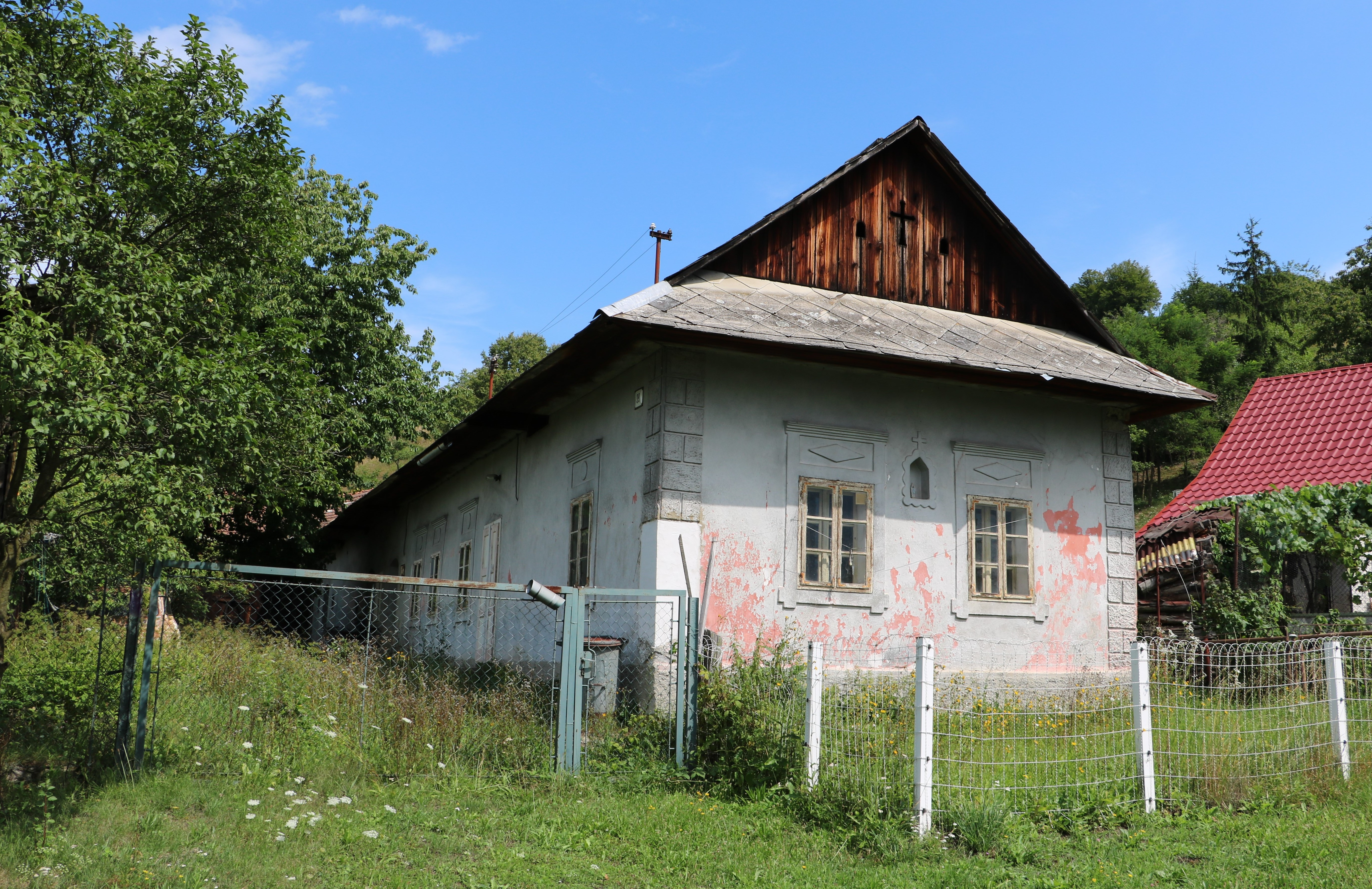 Dlhý kamenný dom s úzkou podstienkou, došteným štítom, výzorníkmi, nikou a nepravou bosážou na nárožiach (aktuálne súpisné č. 39). Šambránu okolo okien dopĺňa rímsová hlavica a kosoštvorec.